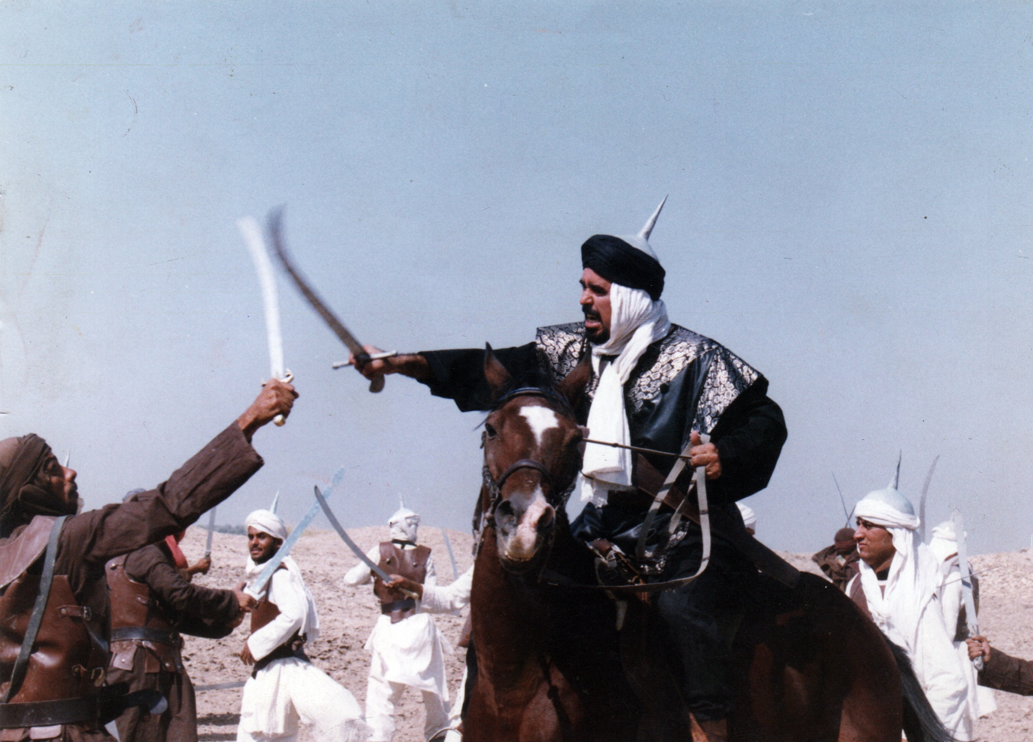 راما